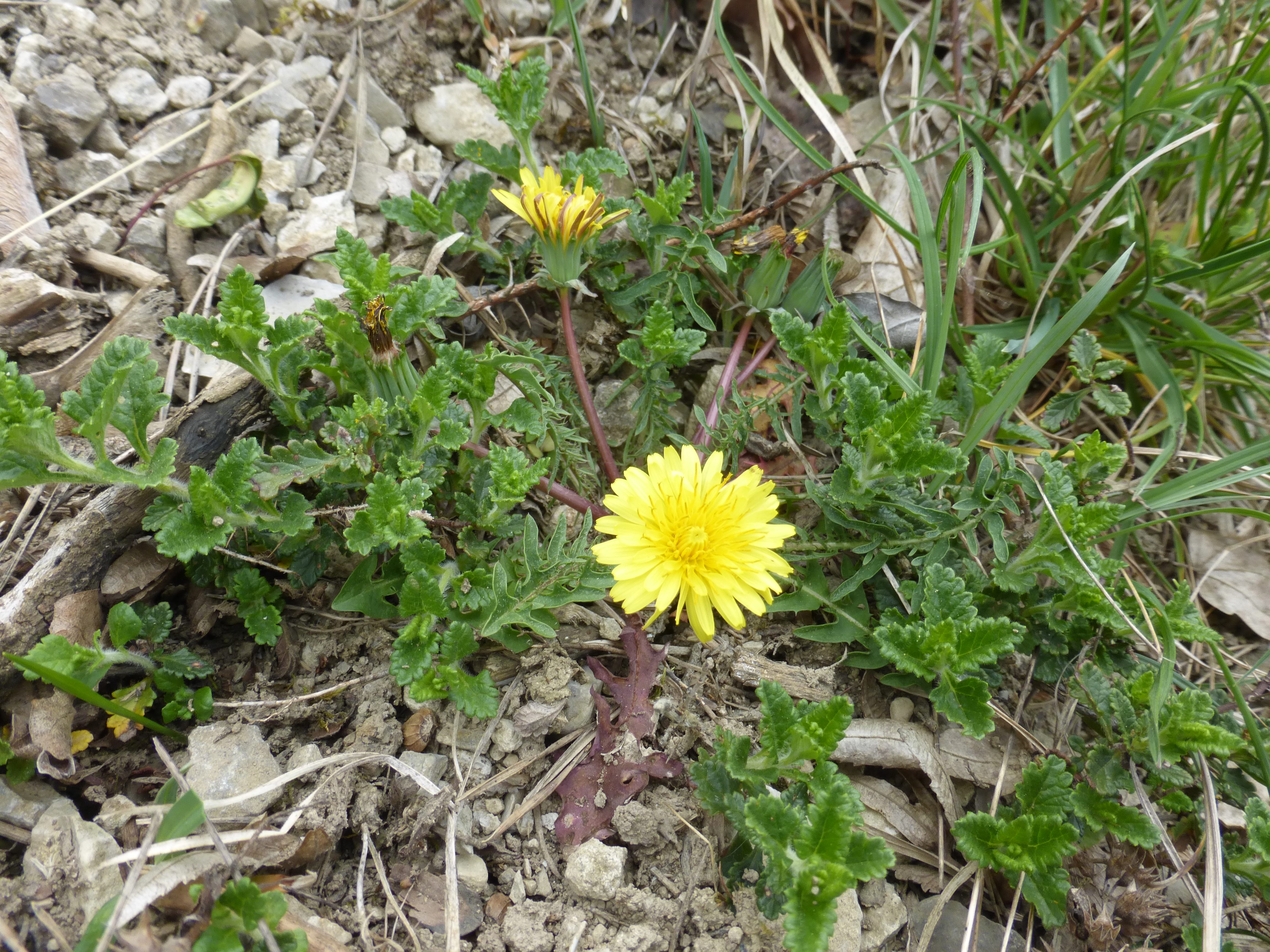 Geröteter Löwenzahn (Taraxacum rubicundum) Hammelrain Markgröningen 14. April 2017